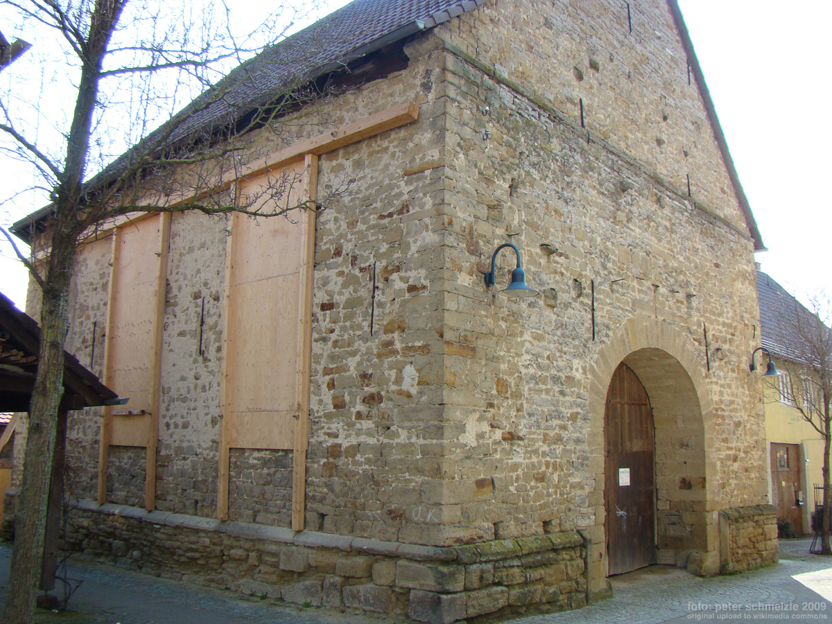 Alte Kirche in Richen (heute Stallgebäude)